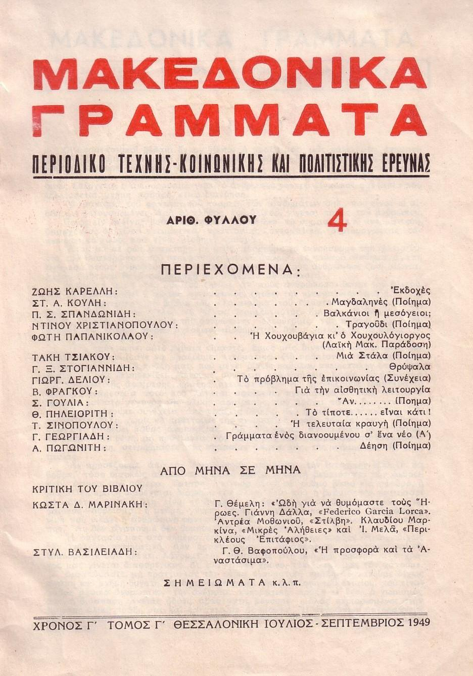 Първа страница на списание "Македоника Грамата".